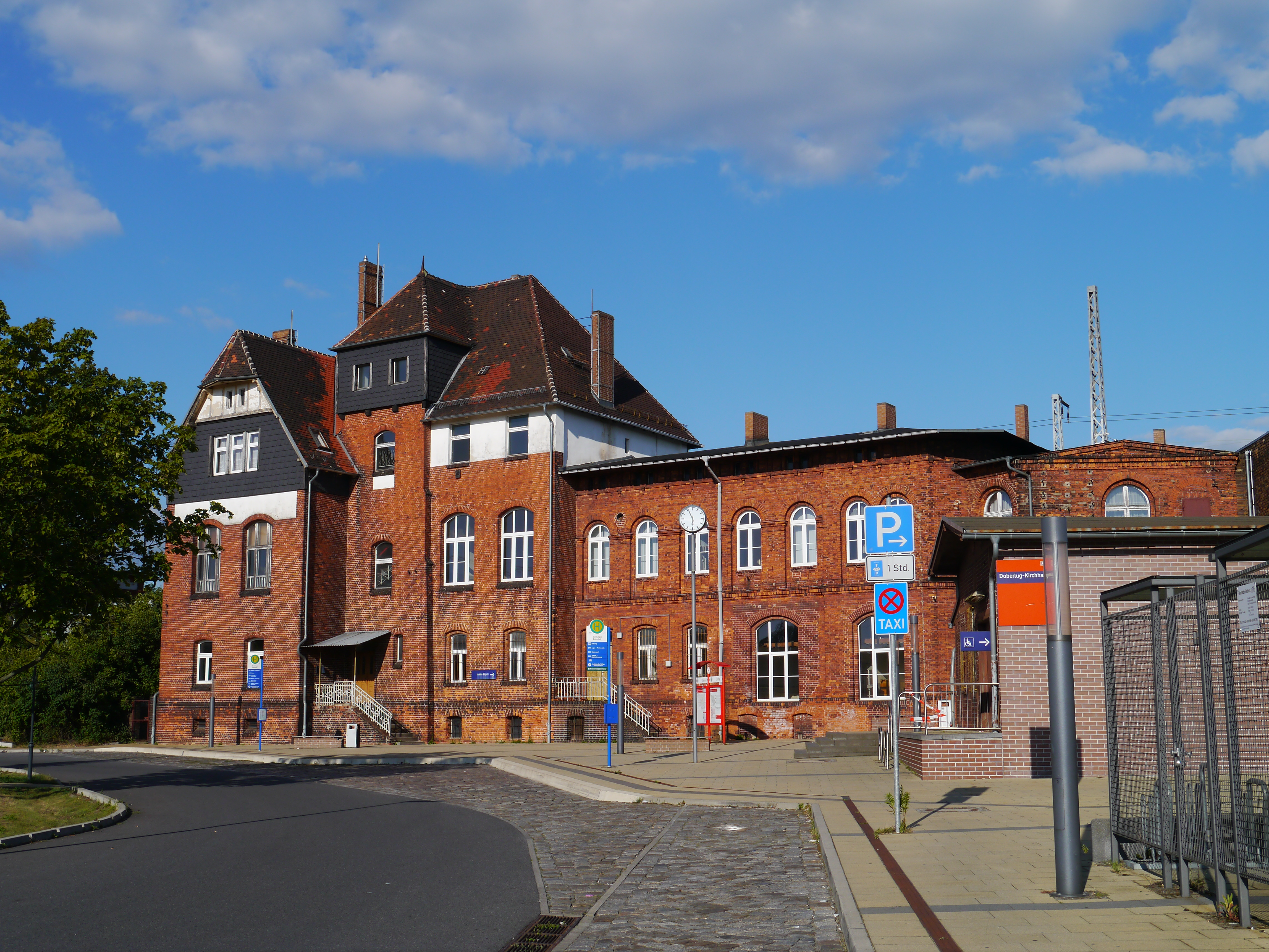 Bahnhof Doberlug-Kirchhain, Brandenburg